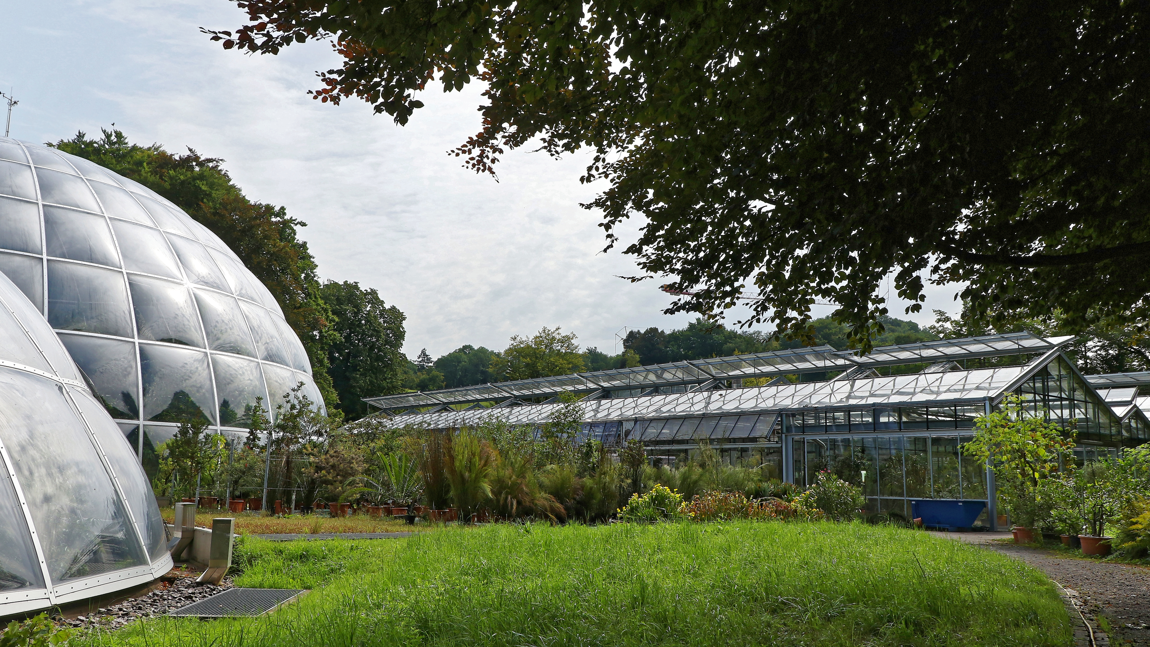 Glaskuppelgewächshäusern links angeschnitten, rechts das neue Gewächshaus in konventioneller Bauweise